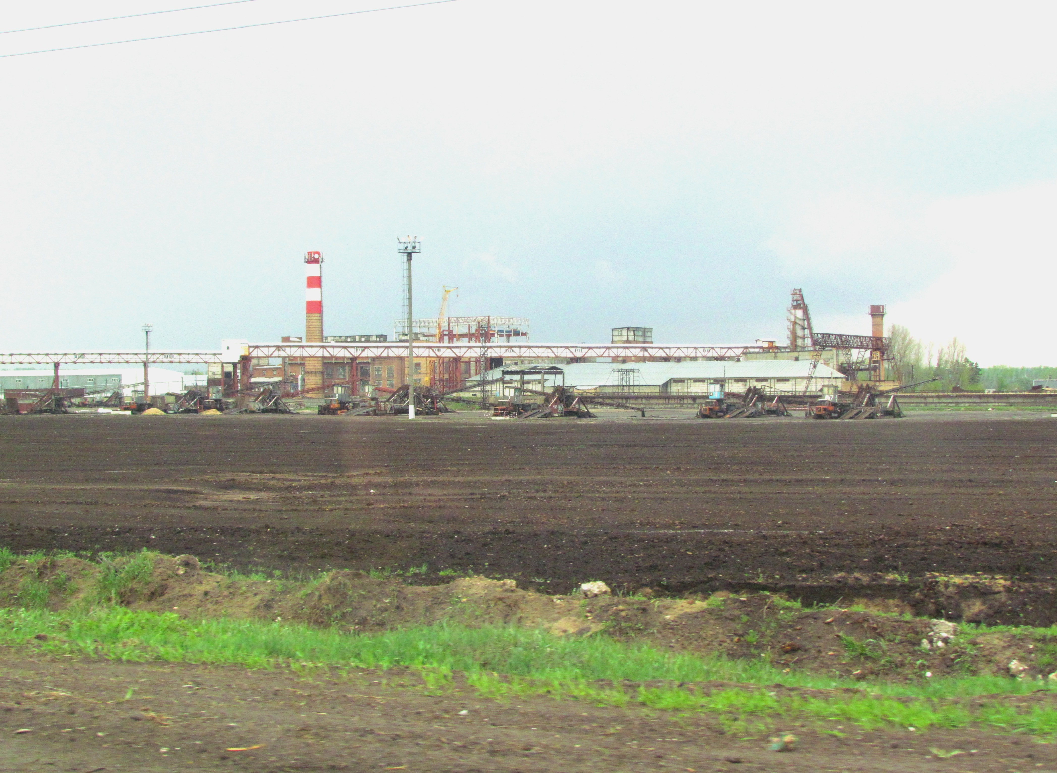 Bekovo Sugar Factory Ltd.